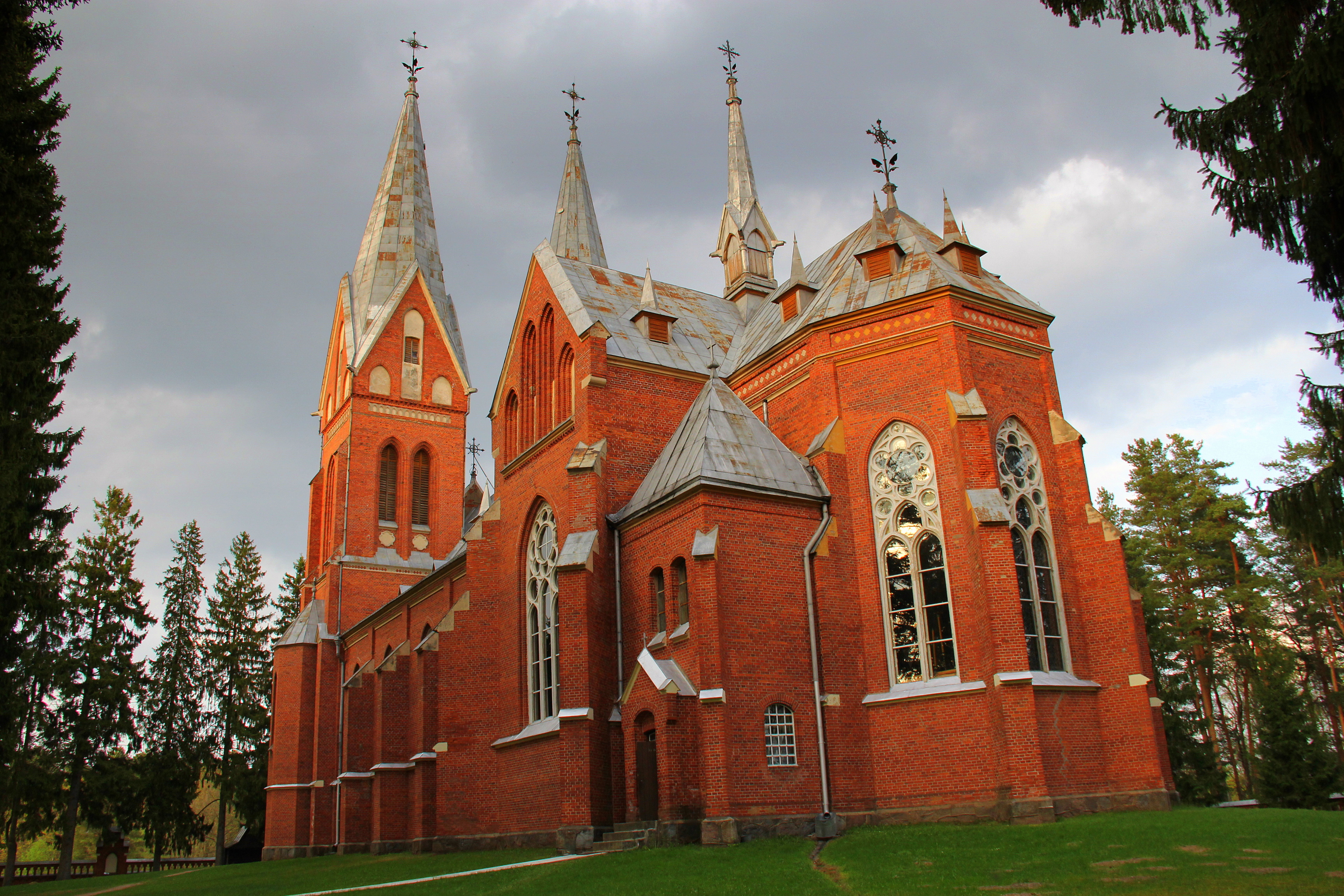 Viļakas katoļu baznīca, Viļaka, Baznīcas iela 56